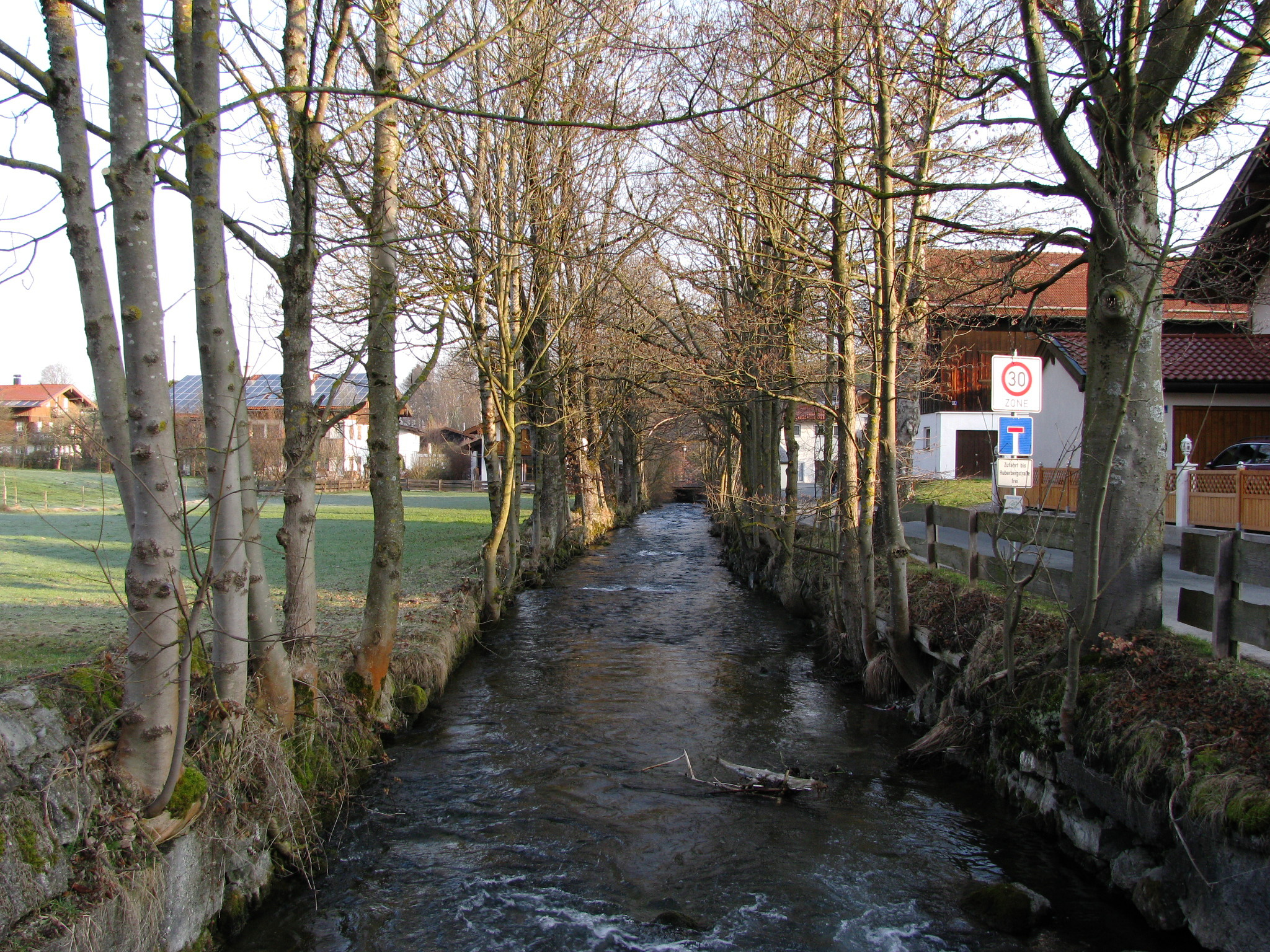 Die Schlierach in Hausham.